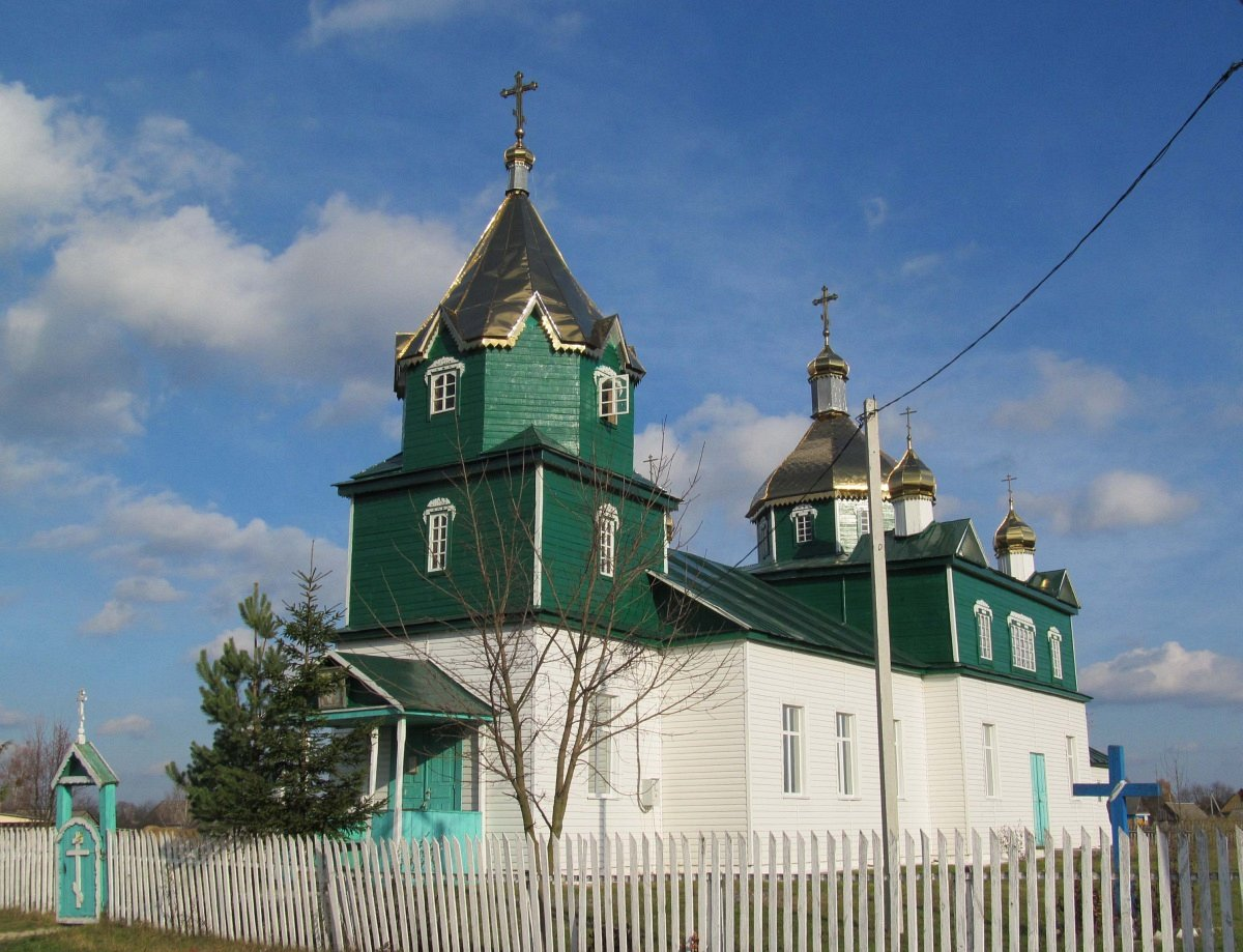 Глушкавічы. Царква